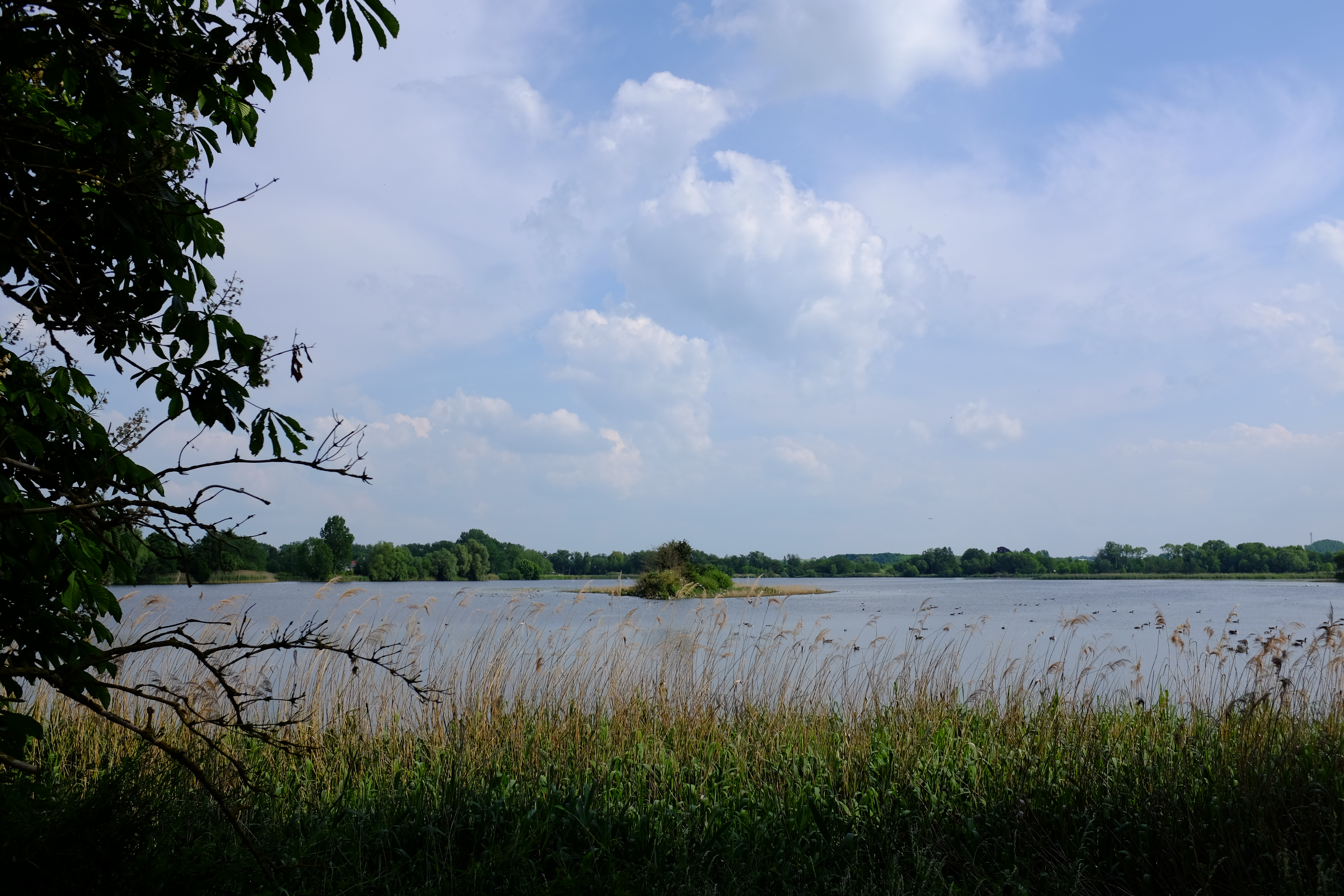 Viereggenhöfer Teich im Naturschutzgebiet „Teichgebiet Wismar-Kluß“ (NSG N146)